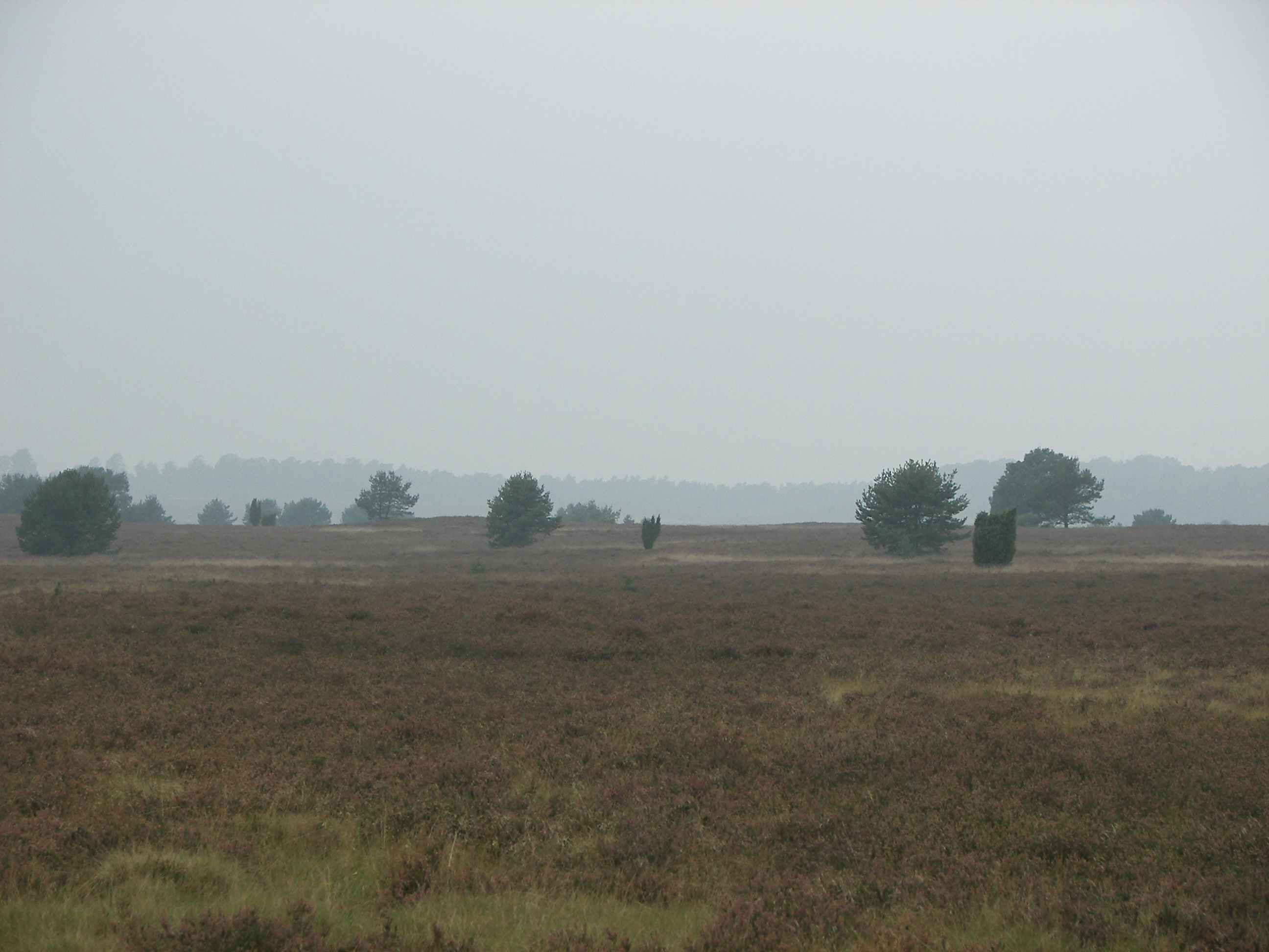 Heide zwischen Tütsberg und Niederhaverbeck